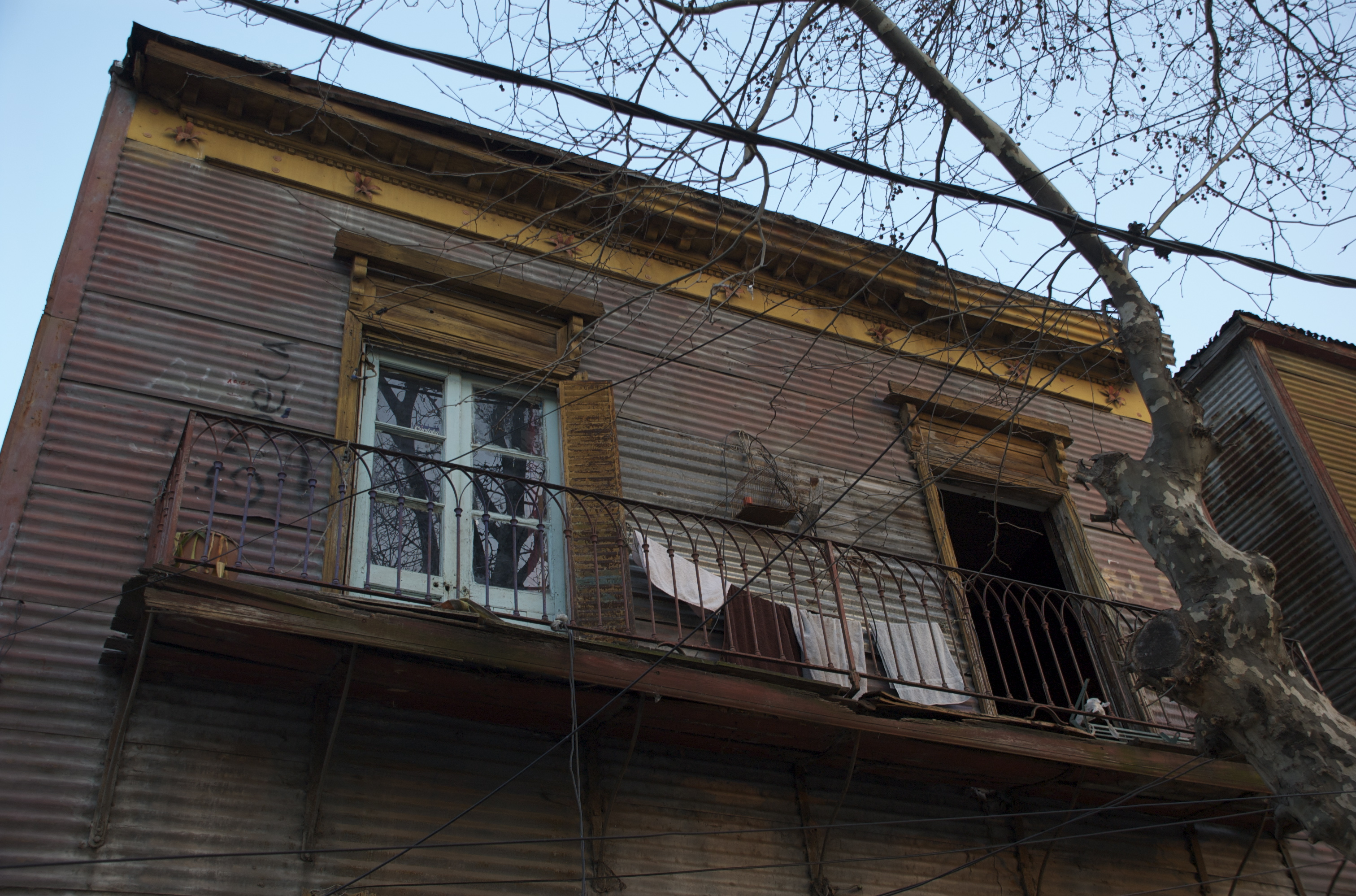 Dock Sud, Partido de Avellaneda, Buenos Aires, Argentina